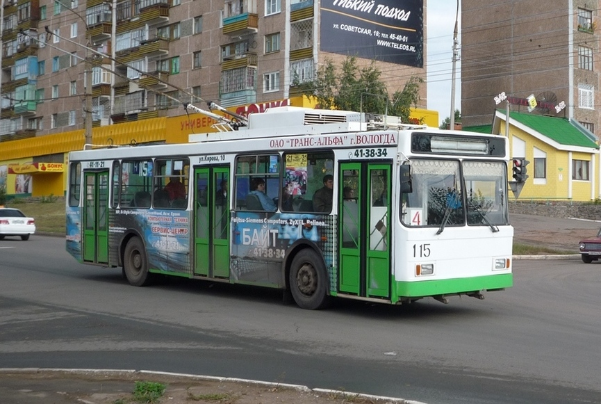 Троллейбус Братска, борт 115, ВМЗ-5298-20